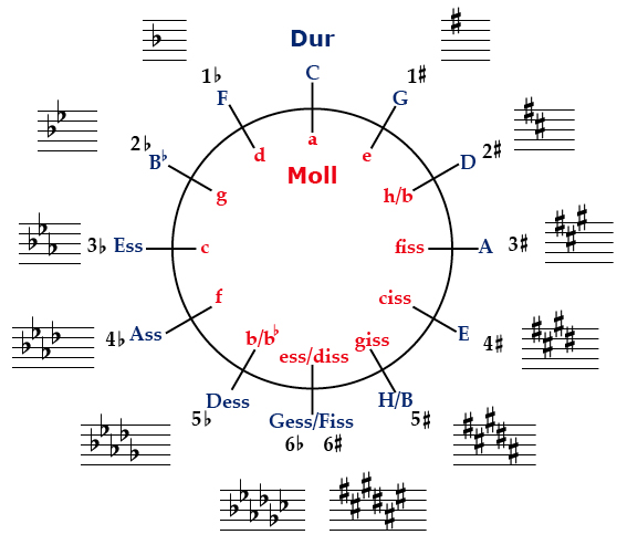 Kvintcirkel med svenska beteckningar.